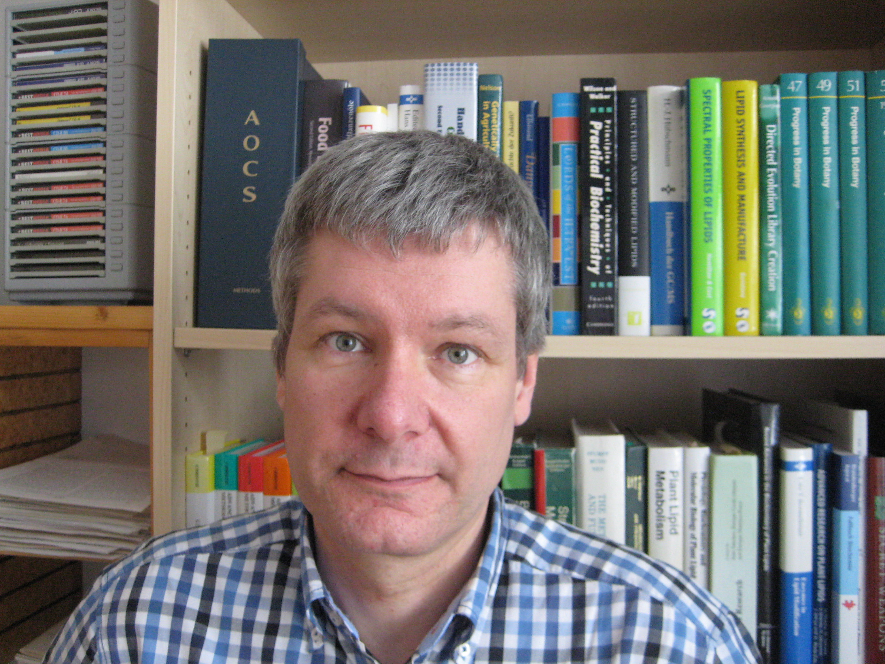 Portrait von Prof. Dr. Ivo Feußner (Pflanzenbiochemiker an der Universität Göttingen)